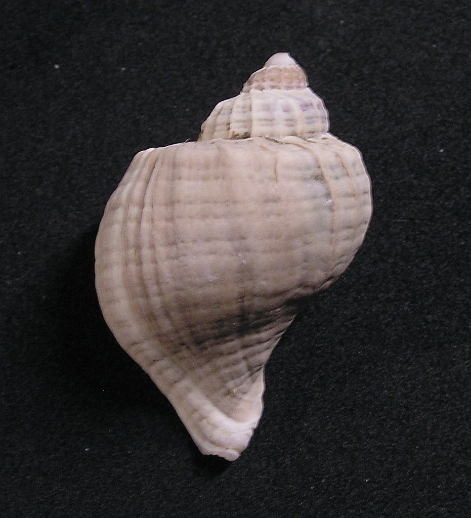 Trophon geversianus acordonada Castellanos, Z.J.A. de, 1993; family Muricidae; Beagle Canal, Argentina